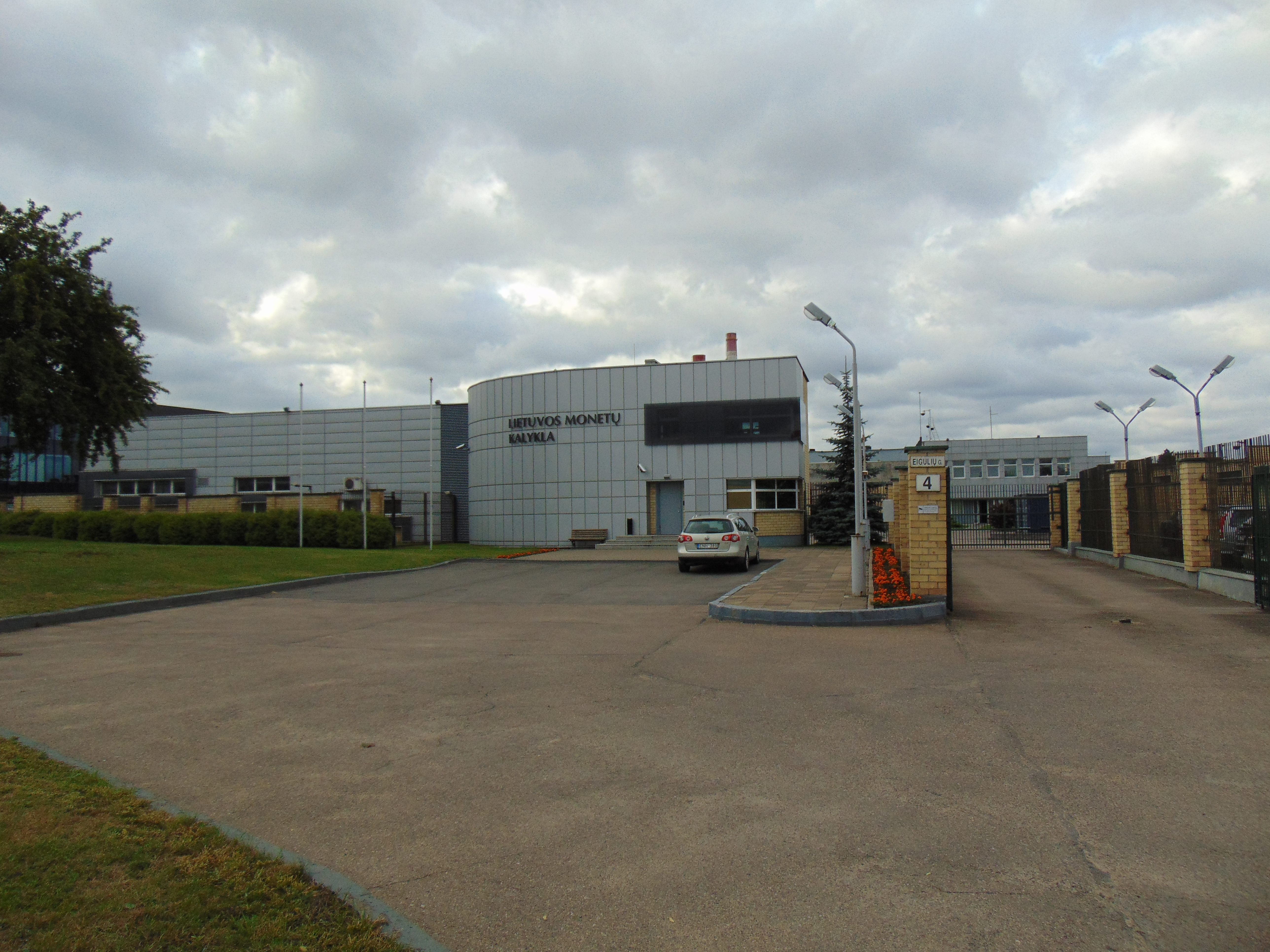 Lietuvos monetų kalykla